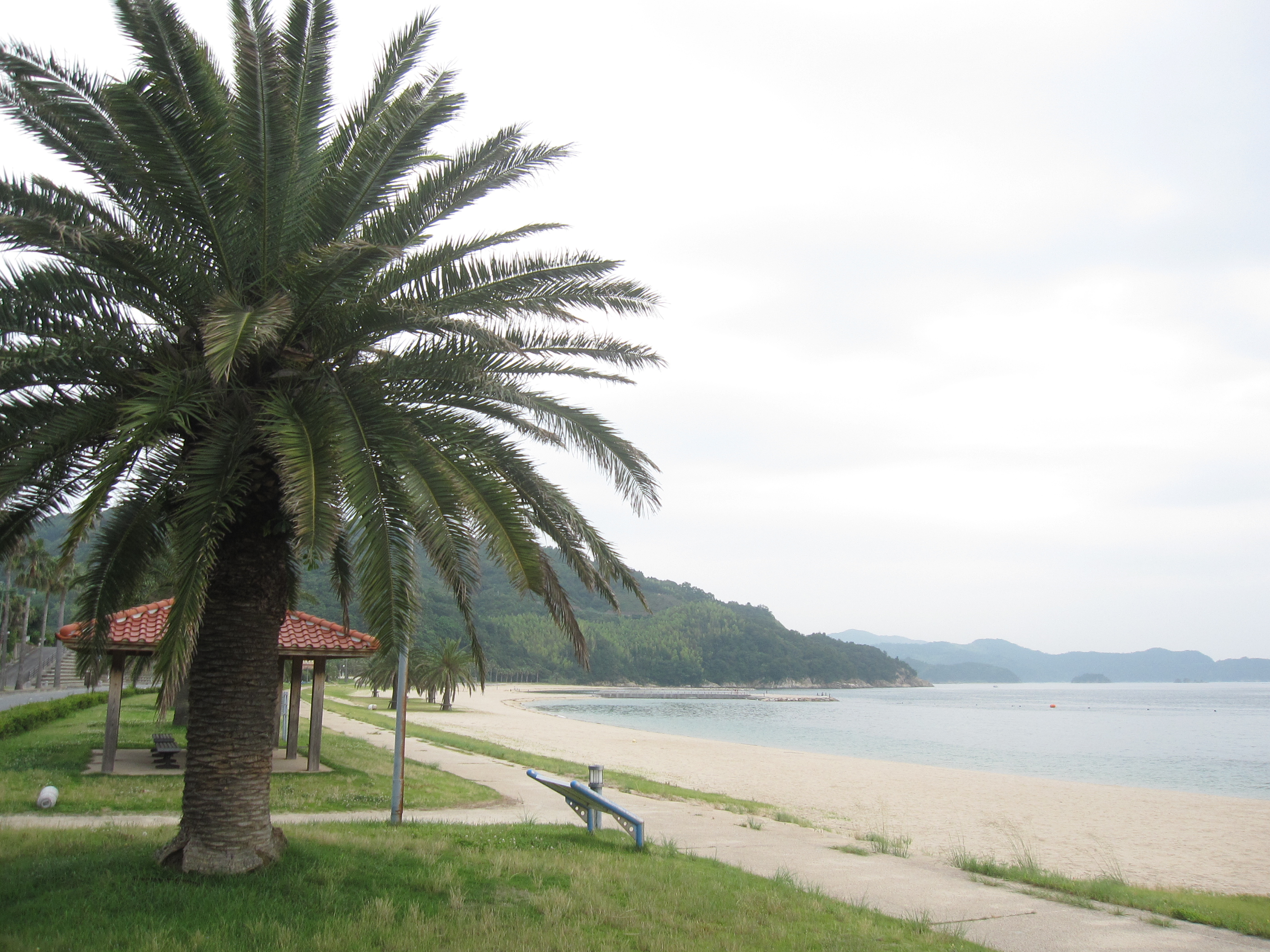 片添ヶ浜